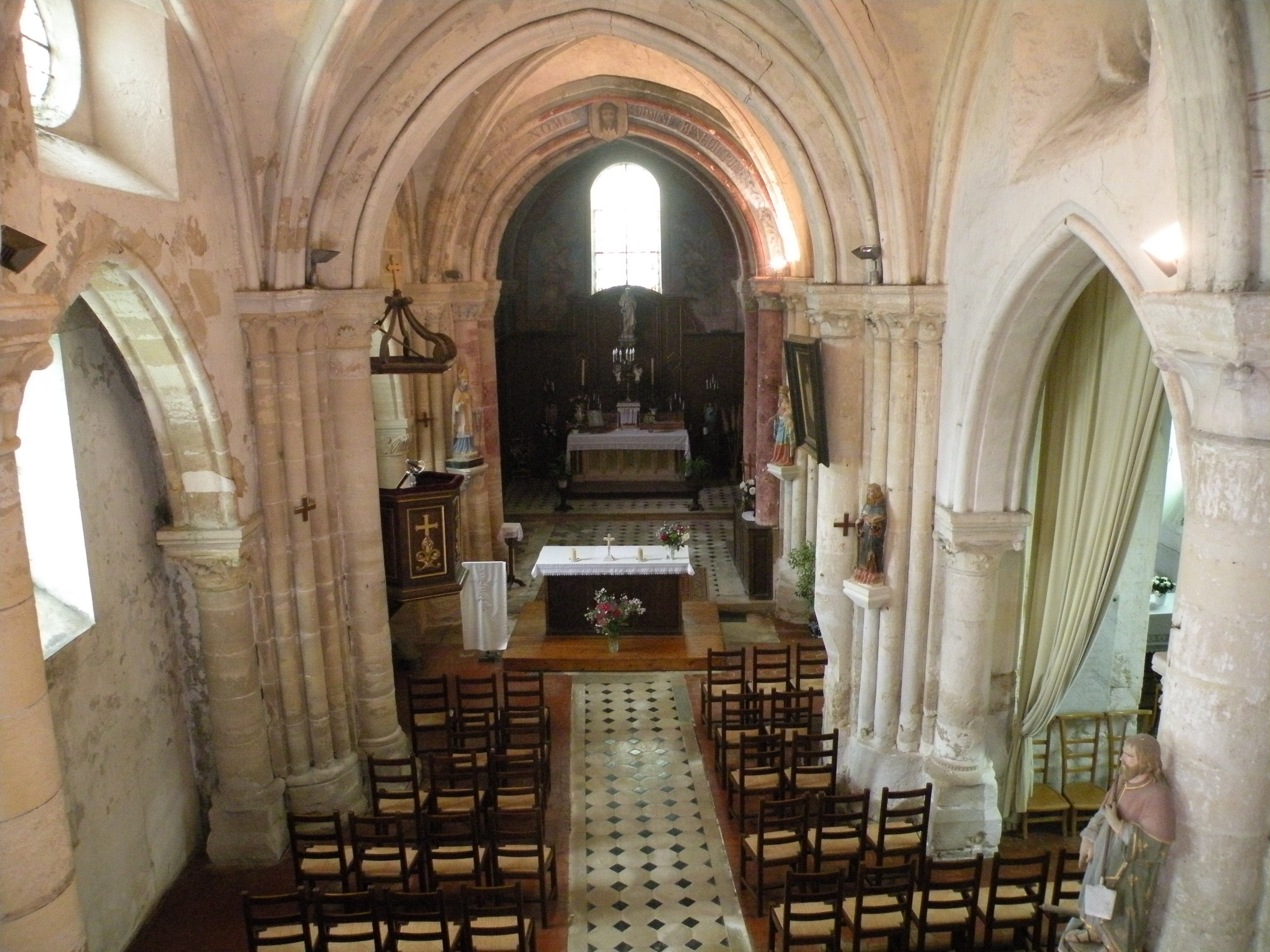 Intérieur de l'église Saint-Martin de Vallangoujard